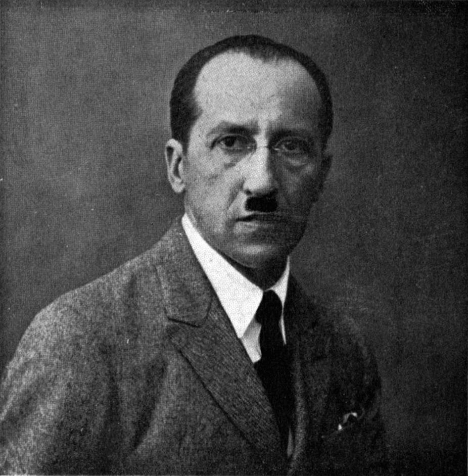 Piet Mondrian. Photo. From De Stijl, vol. 5, nr. 12 (December 1922): p. 179.